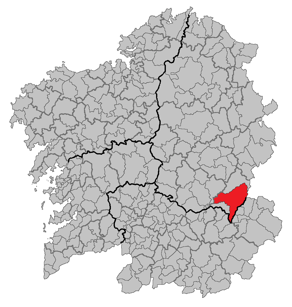 Mapa coa localización do concello de Quiroga.